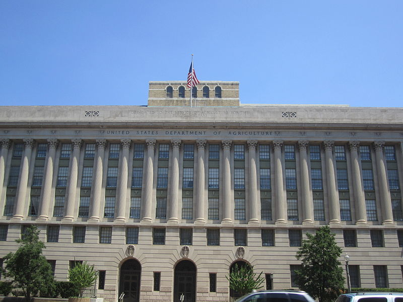 สำนักงานใหญ่ของ USDA